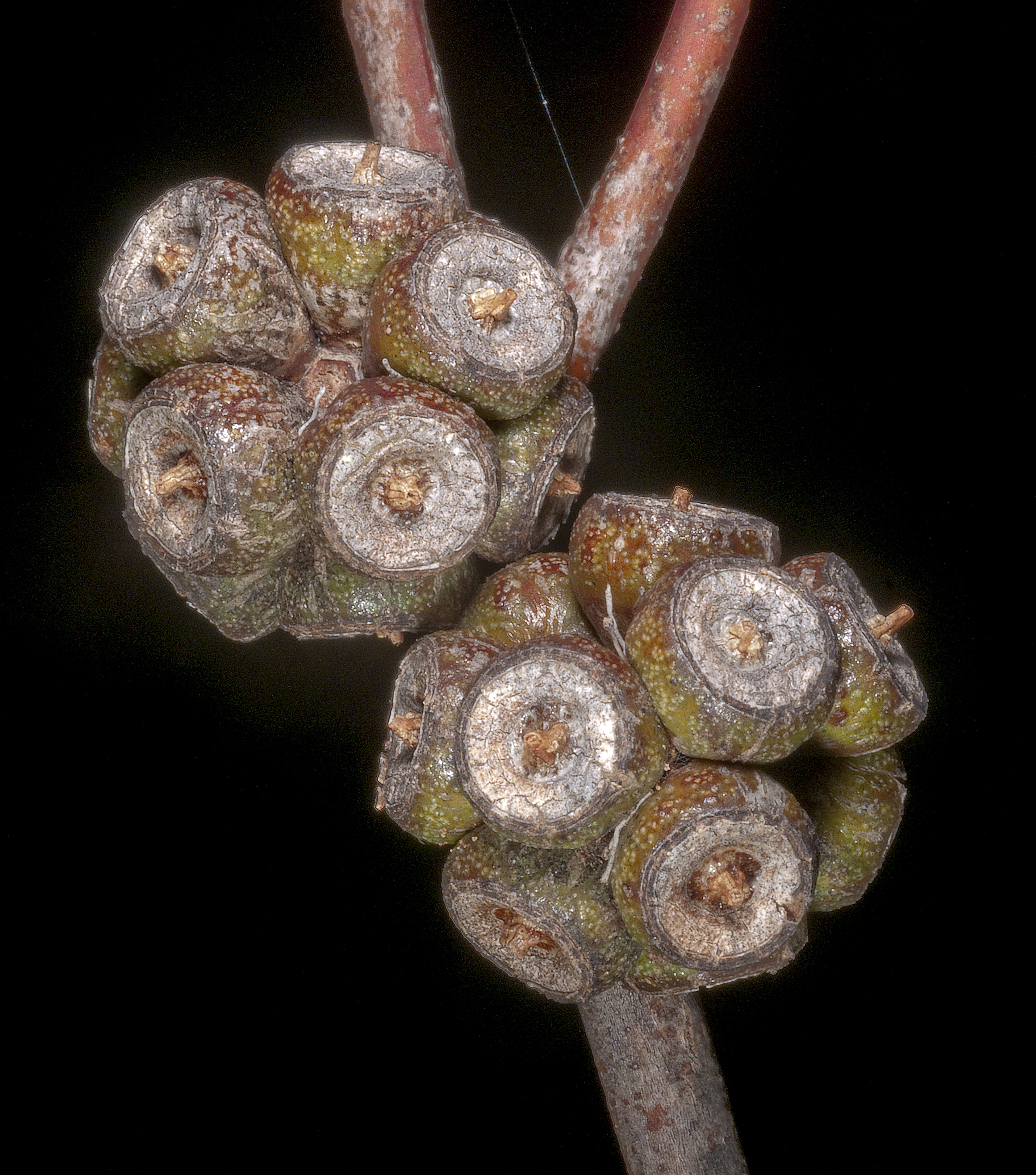 KRT3975